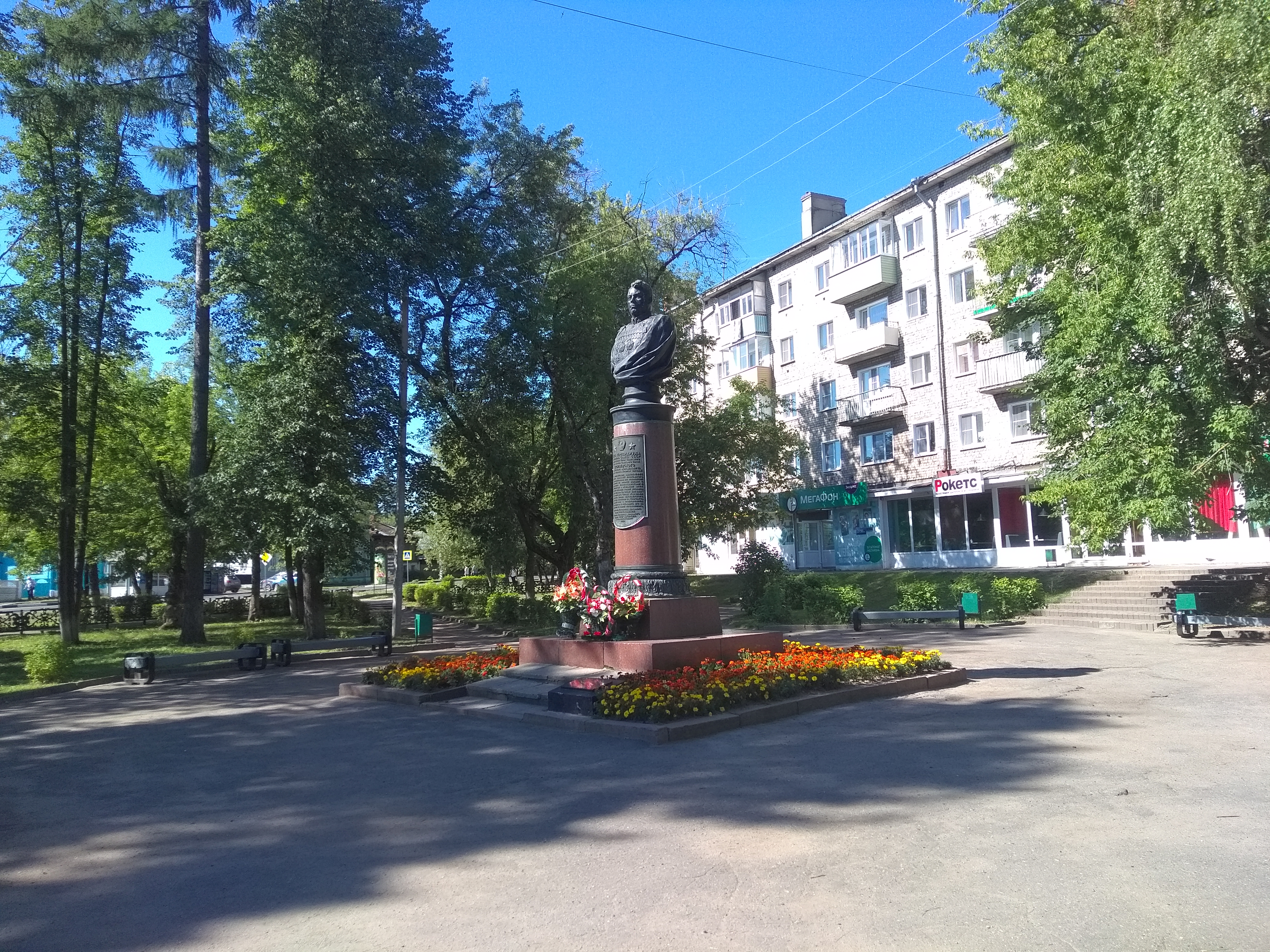 Памятник (бюст) маршалу Александру Василевскому, сквер имени Маршала Василевского, Кинешма, Ивановская область.